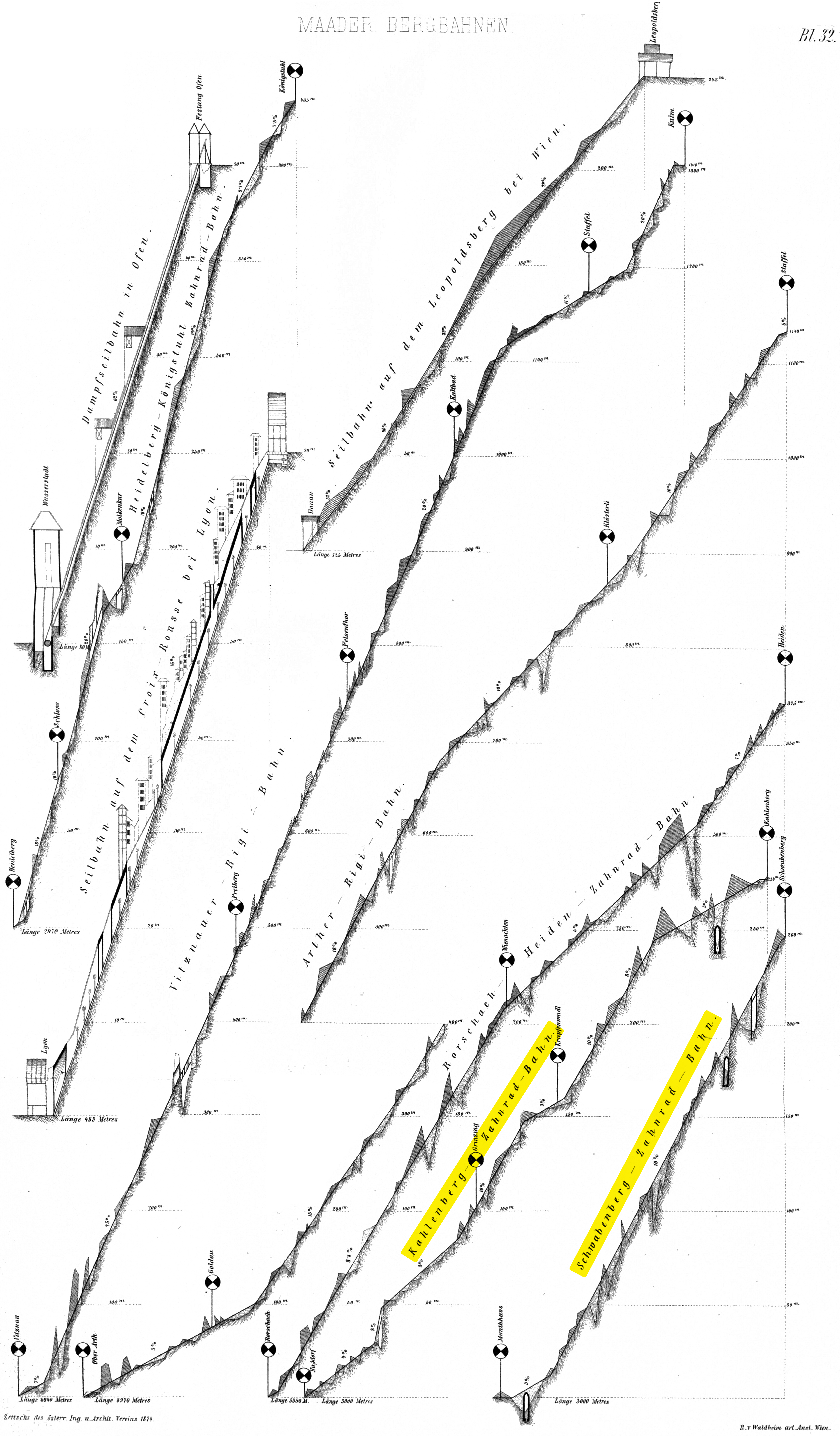 Schwabenbergbahn, Budapest, Svábhegy, im Profilvergleich